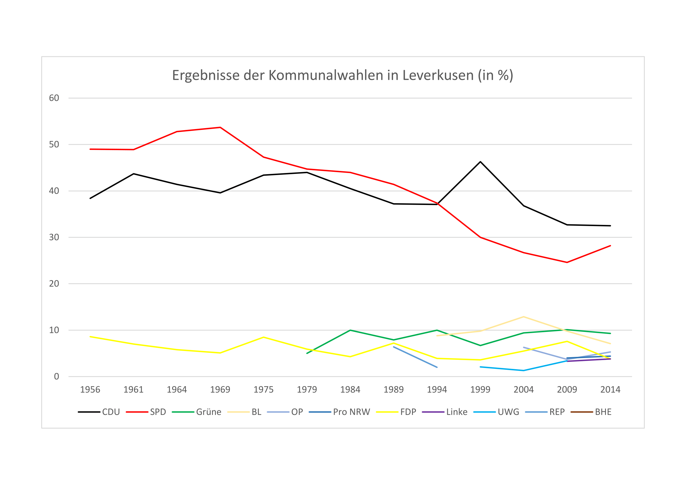 Diese Grafik zeigt die Ergebnisse der Kommunalwahlen in Leverkusen